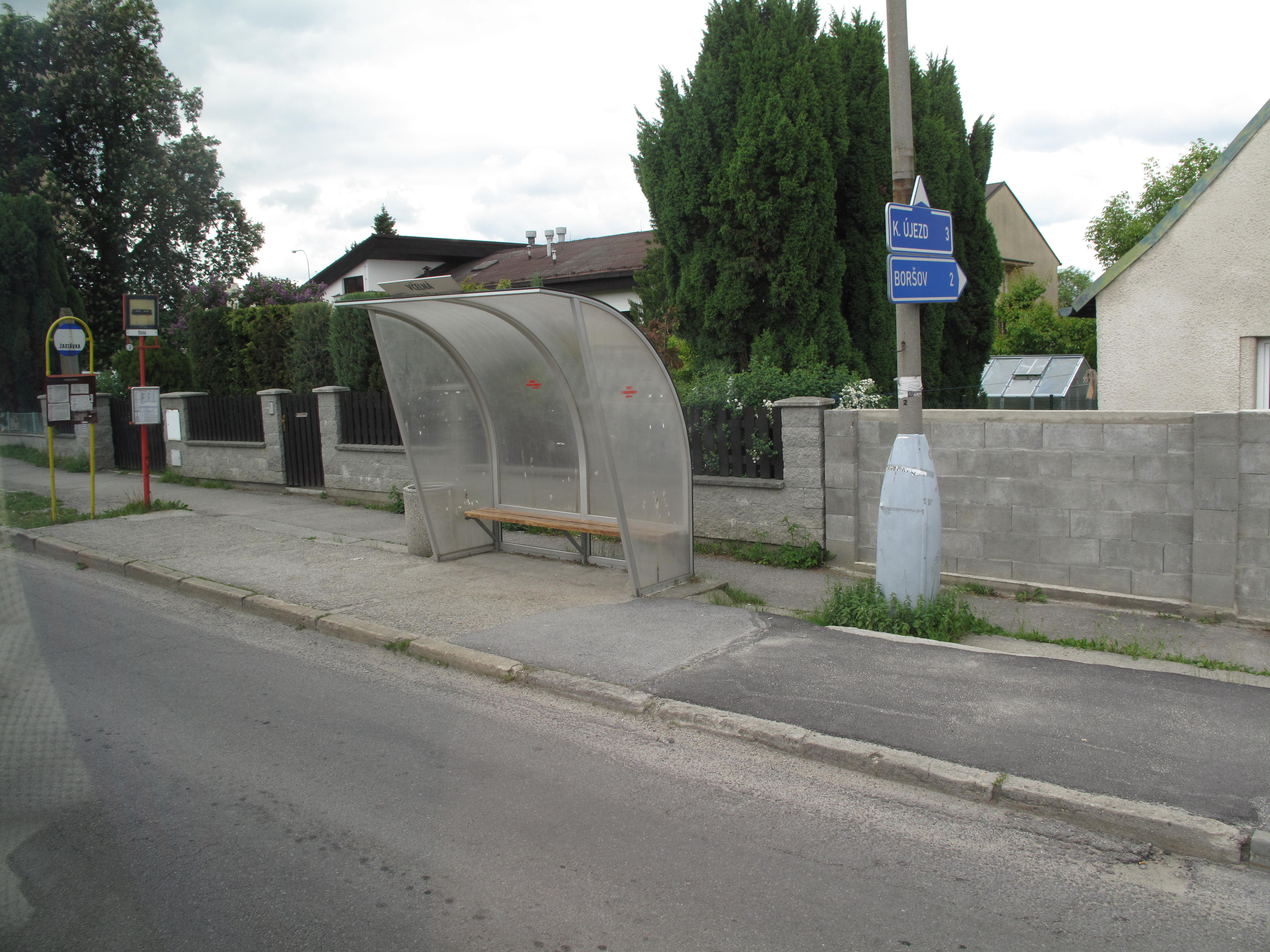 Včelná, autobusová zastávka